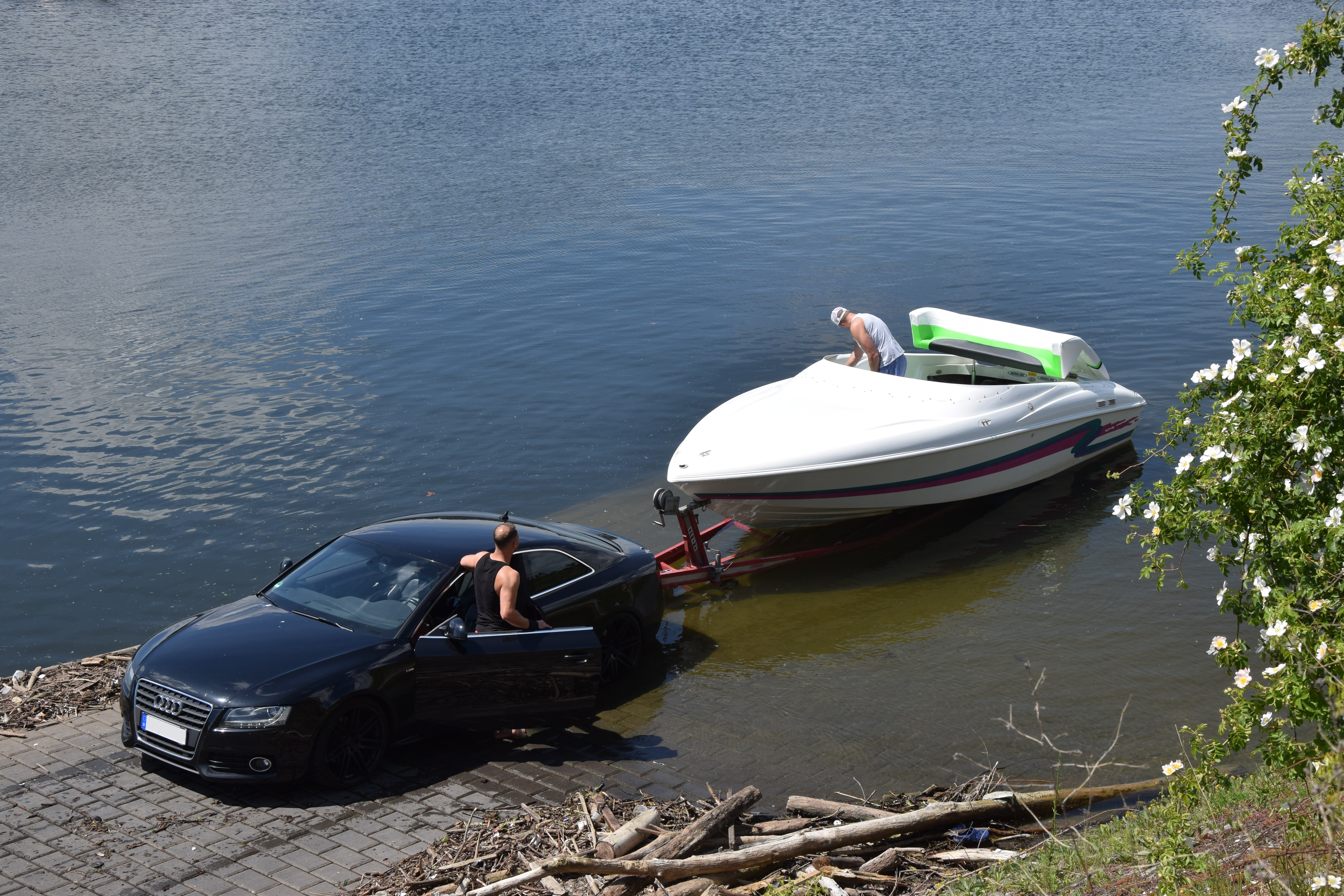 Bootsrampe am Schiersteiner Osthafen im Einsatz